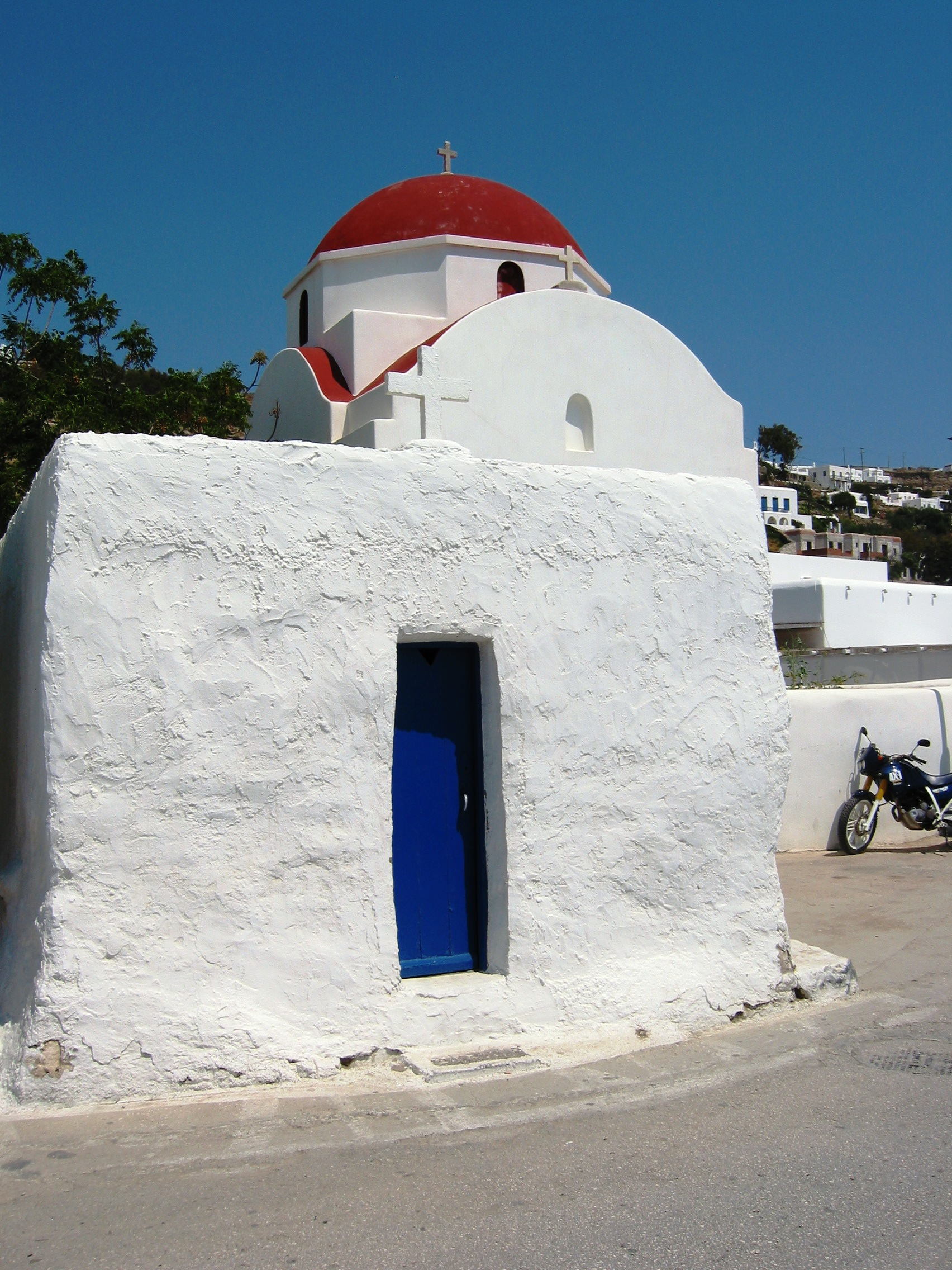 Mykonos, chapelle. Photo prise le 23/05/2004 par Harrieta171